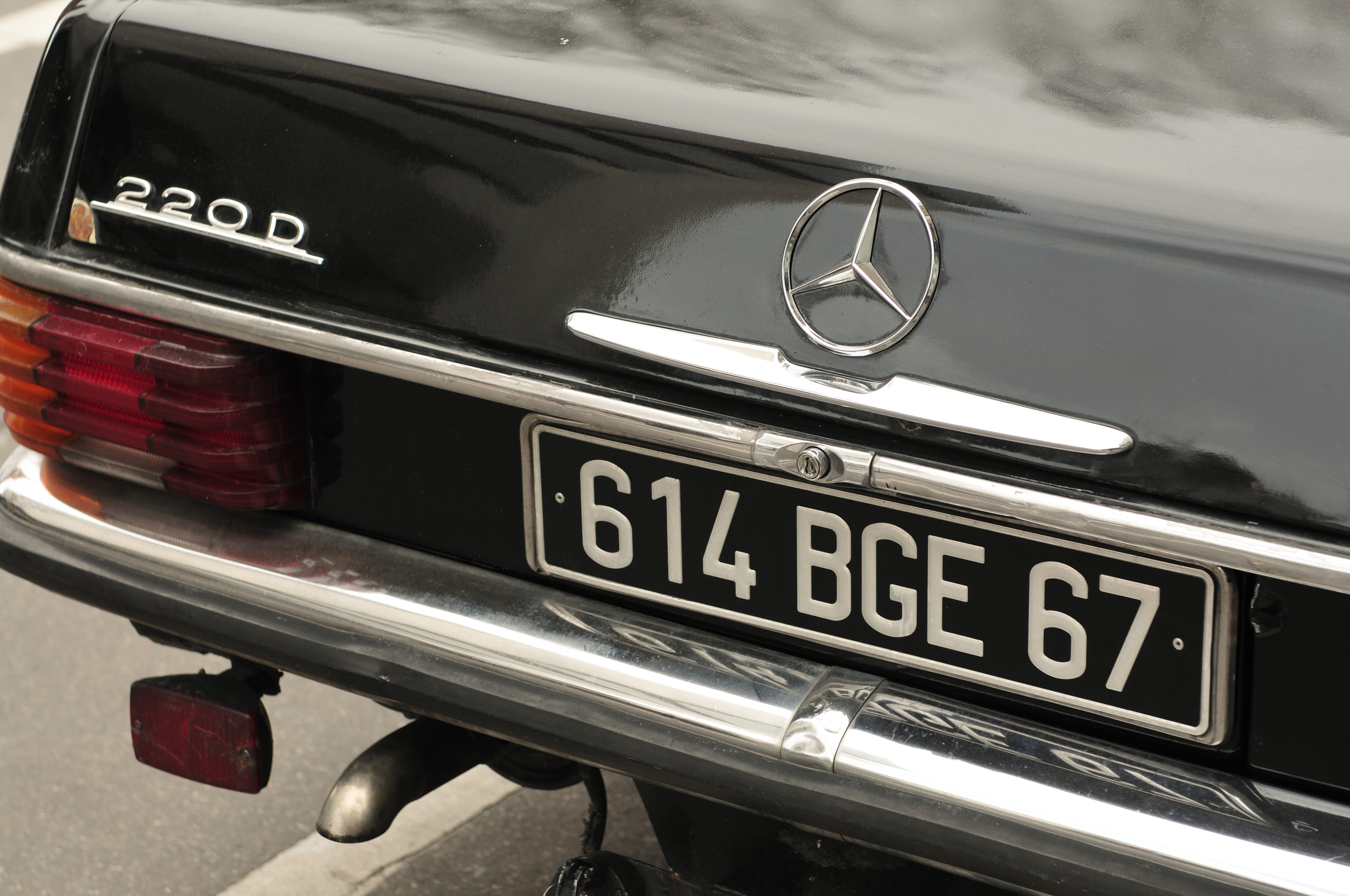 Strasbourg